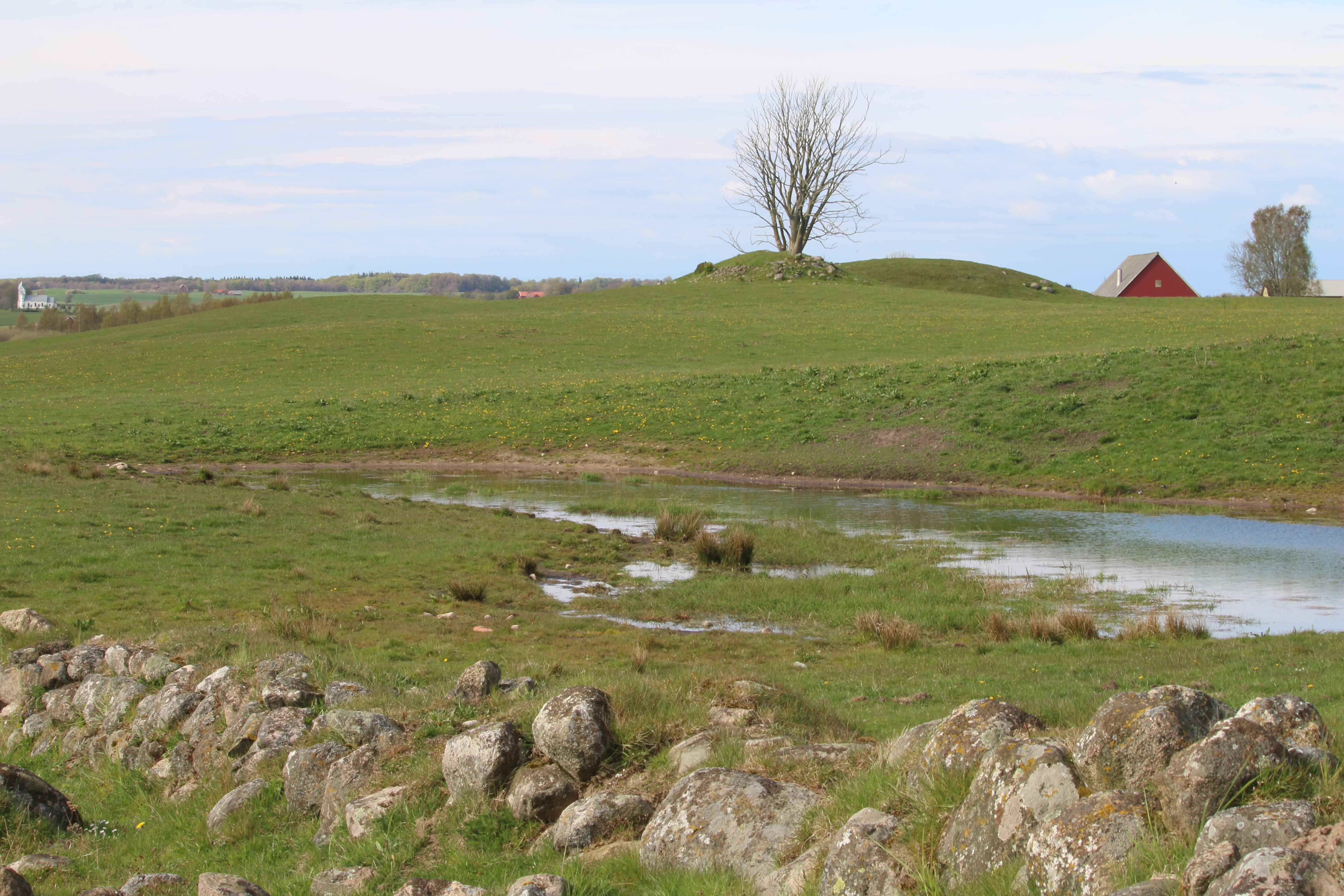 Högestads mosse maj 2017